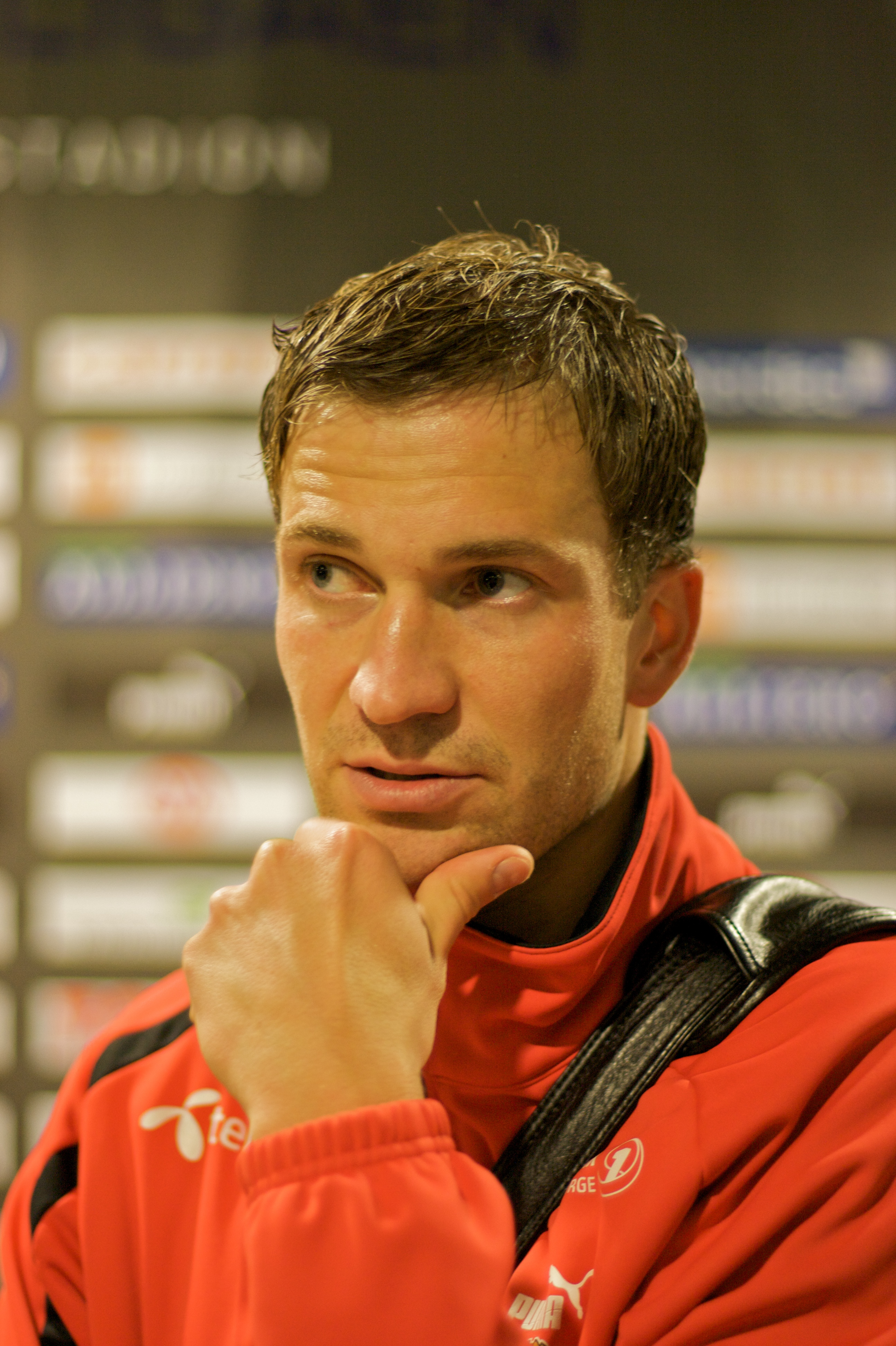 Miika Koppinen, finsk fotballspiller.